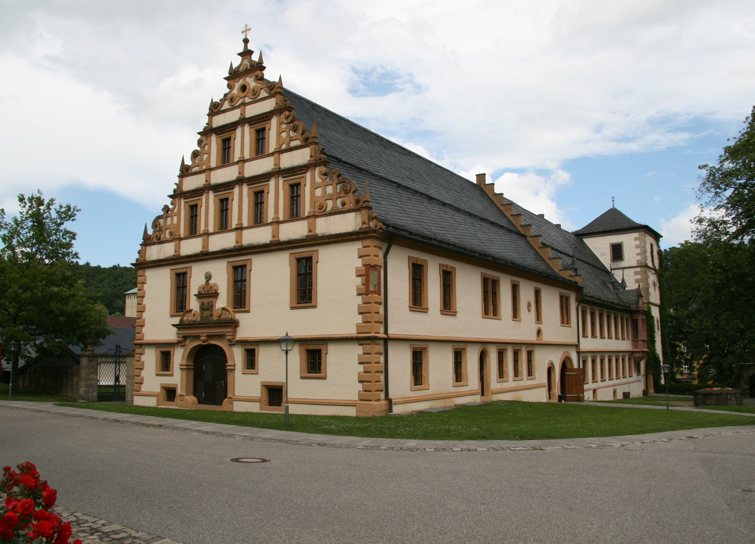 Abtei- und Syndikatsbau, 1625 erbaut als Prälatenwohnung von Abt Georg Kihn, Kloster Maria Bildhausen